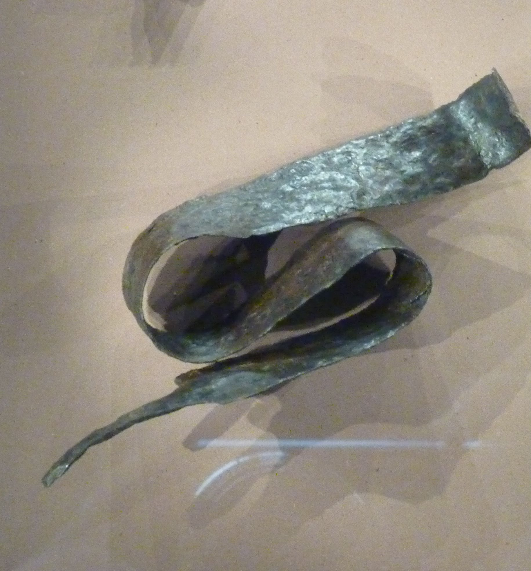 gebogenes Schwert